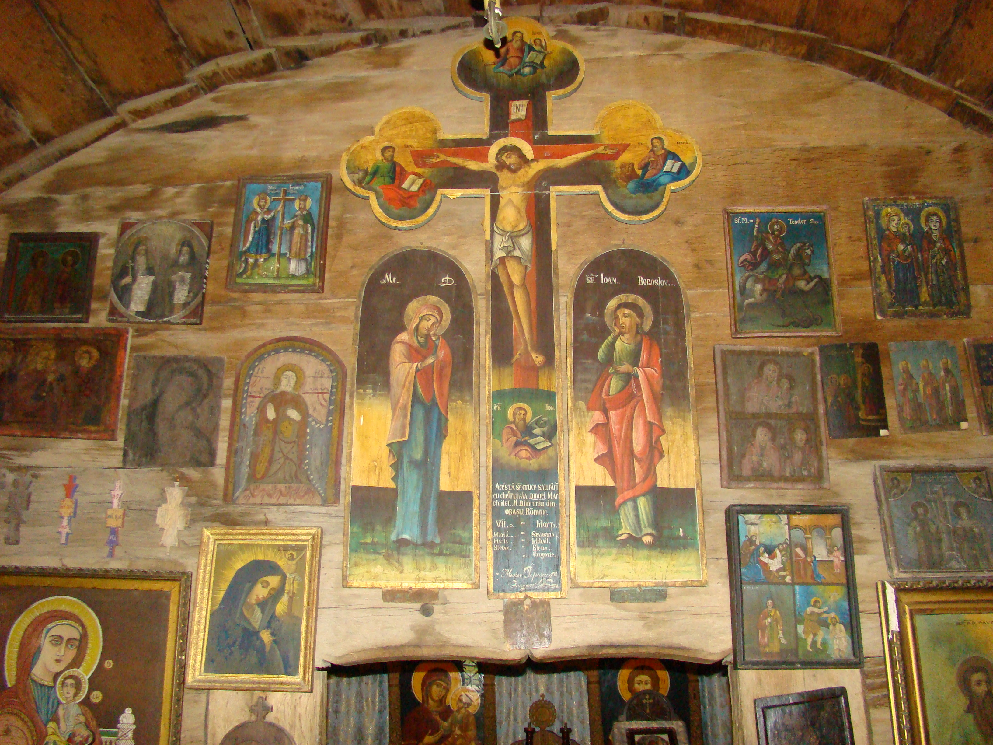 Mănăstirea dintr-un lemn, Frâncești, Vâlcea